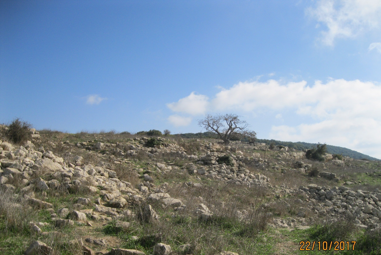 Bak Ruins